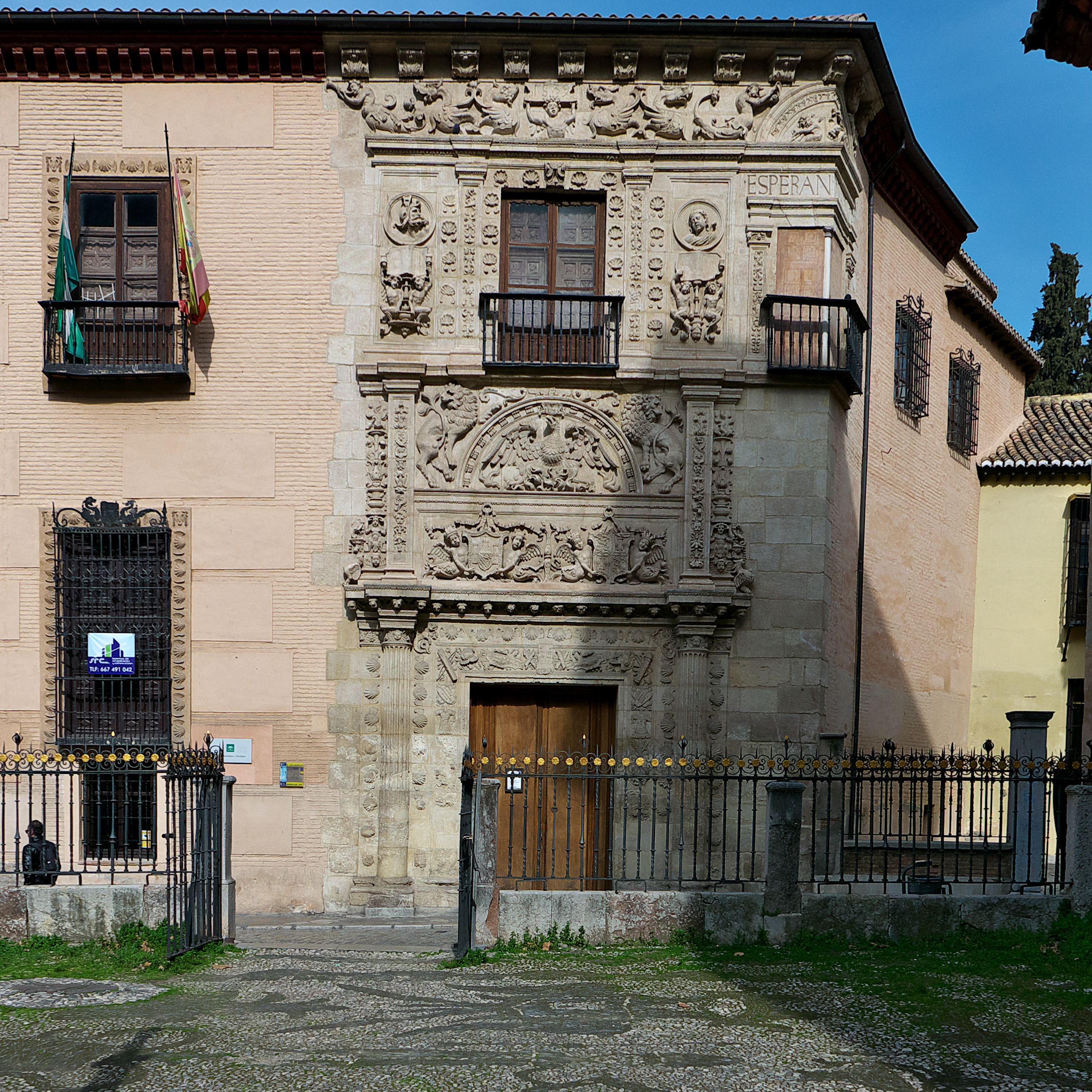 Residencia de los Hernando de Zafra en Granada. Atribuida a Sebastián de Alcántara (1539).